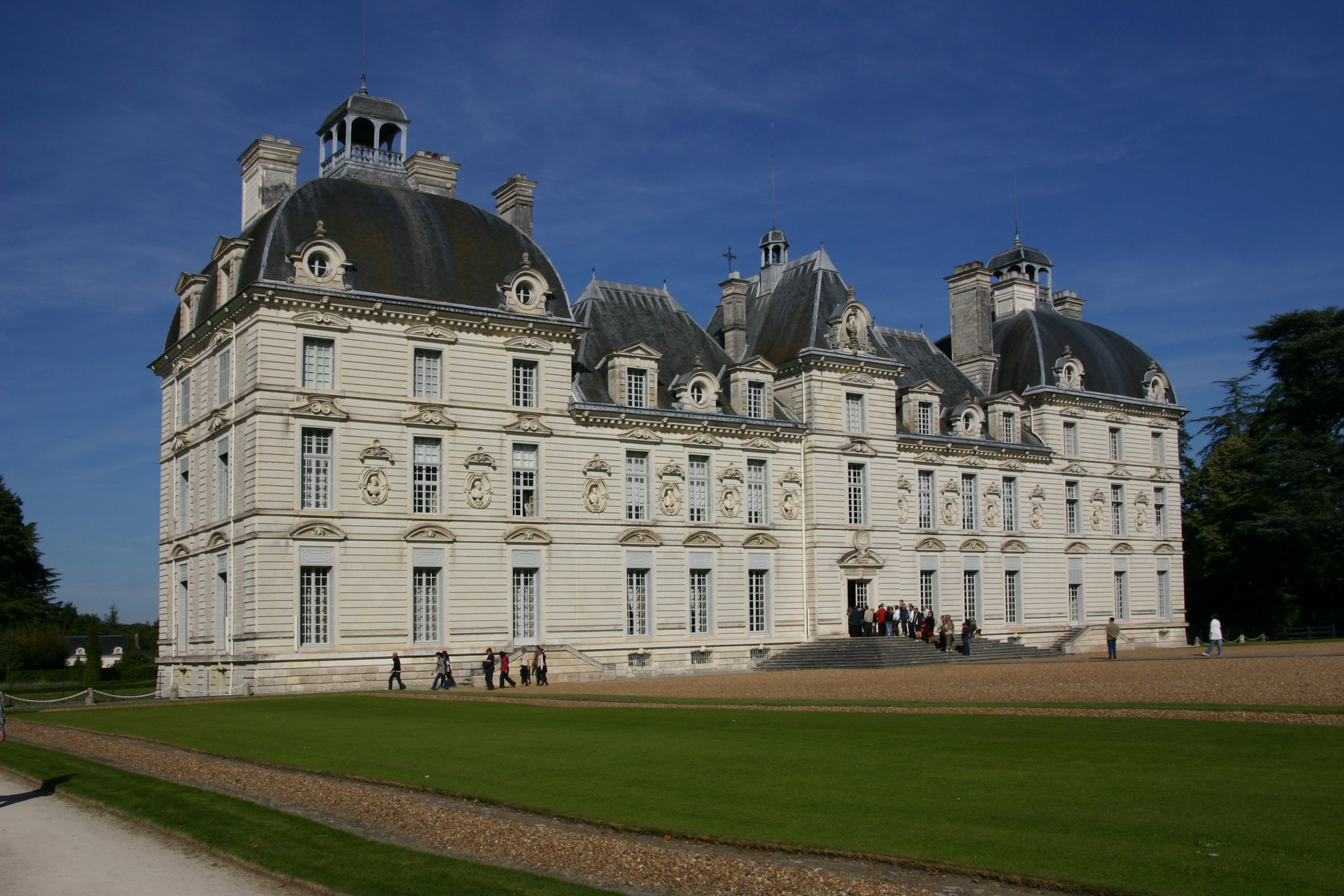 Château de Cheverny